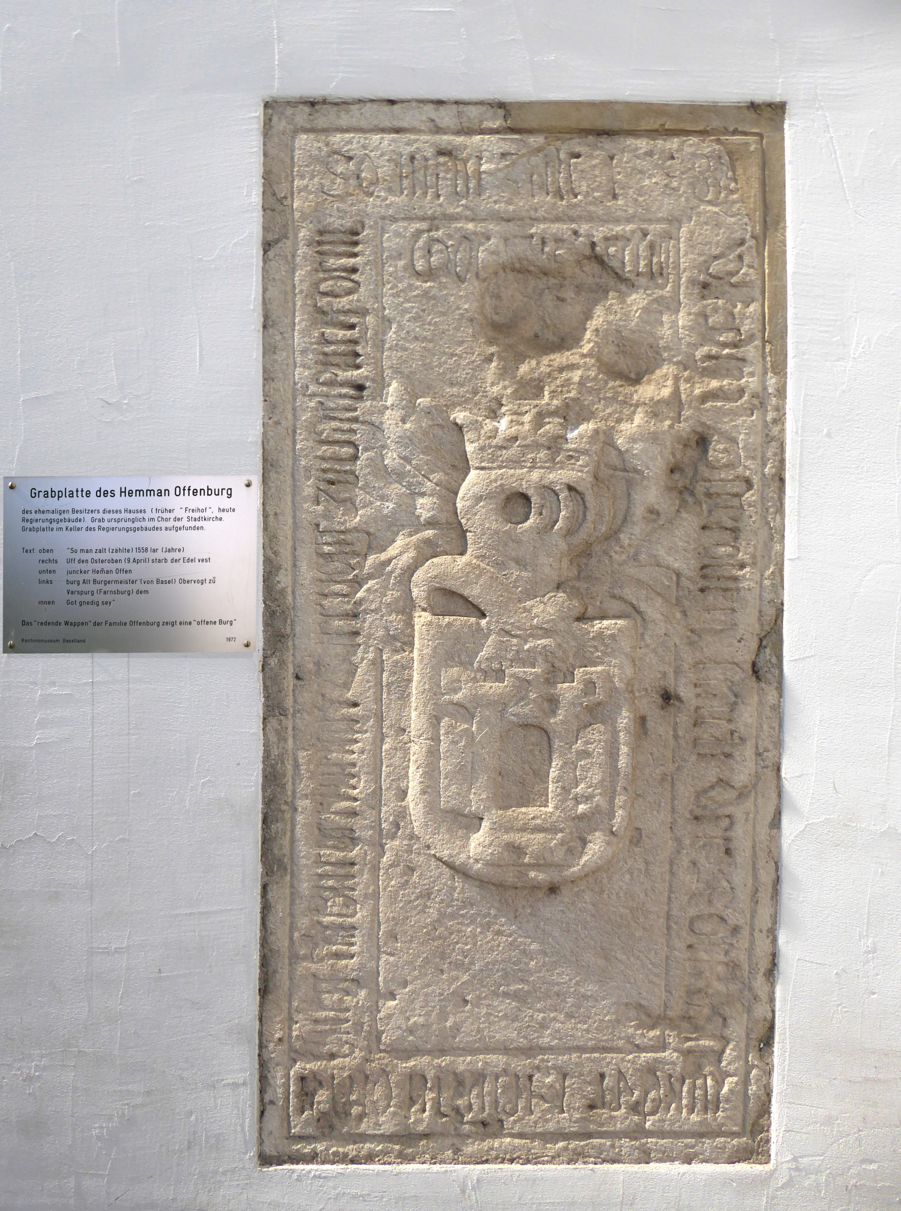 Henman Offenburg (1379–1459) Kaufmann, Politiker, Diplomat. Der ehemalige Besitzer dieses Hauses, früher „“Freihof“, heute Regierungsgebäude Liestal. Sein Grab war ursprünglich im Chor der Stadtkirche. Die Grabplatte wurde im Keller des Regierungsgebäudes gefunden und ist am Regierungsgebäude von Liestal zu sehen Text oben: So man zahlt (zählte) 1558 lar (Jahre). Text rechts: Uff den Osteroben (9. April) starb Edel vest. Text unten: juncker Heman Offen. Text links: burg Alt Burgermeister (von Basel) Obernvogt zu Varsburg (Farnsburg) dem. Texxt innen: God gnedig sey. Das “redenden Wappen“ der Familie Offenburg zeigt eine “offene Burg“